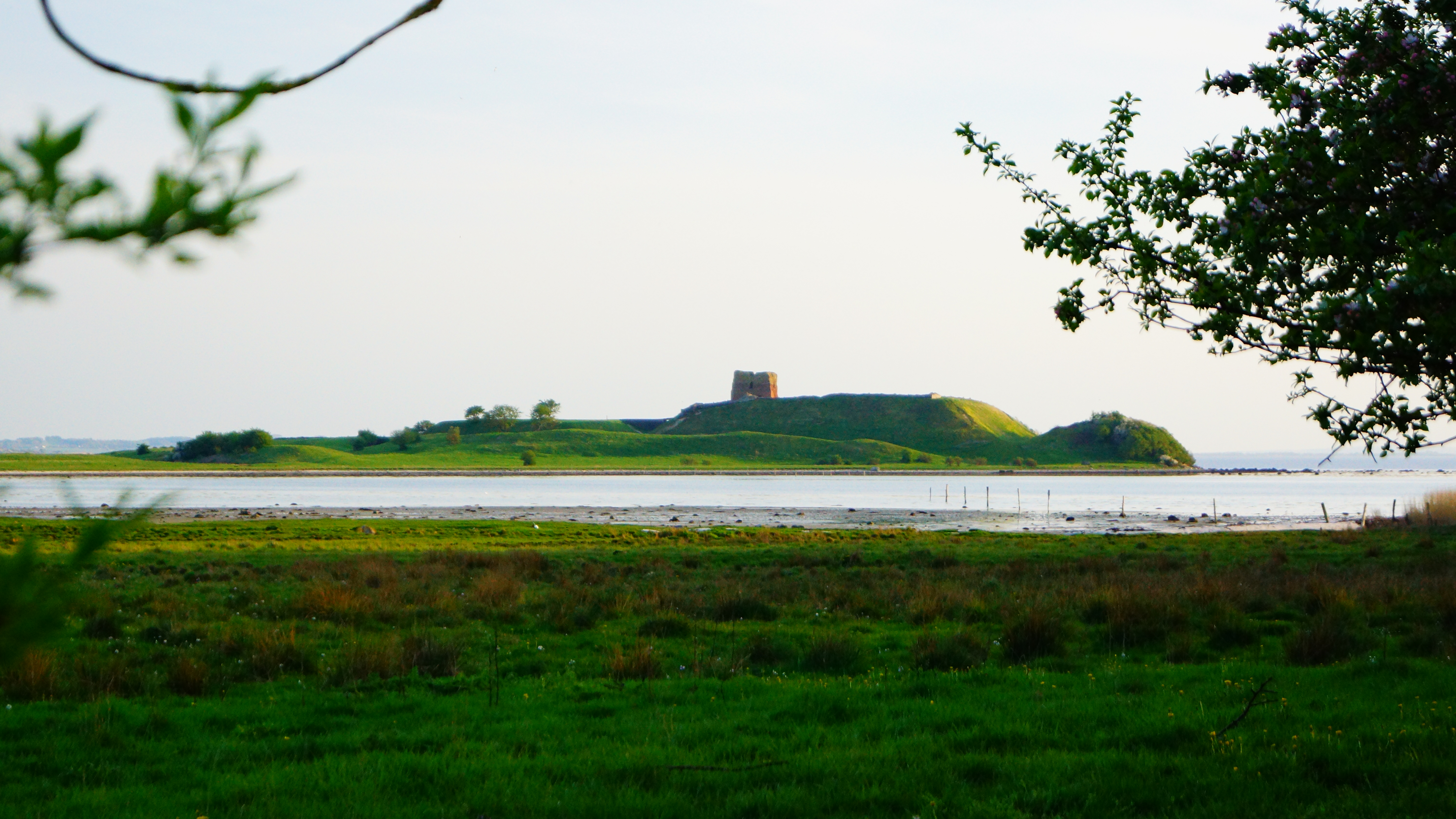 Kalø Slotsruin x